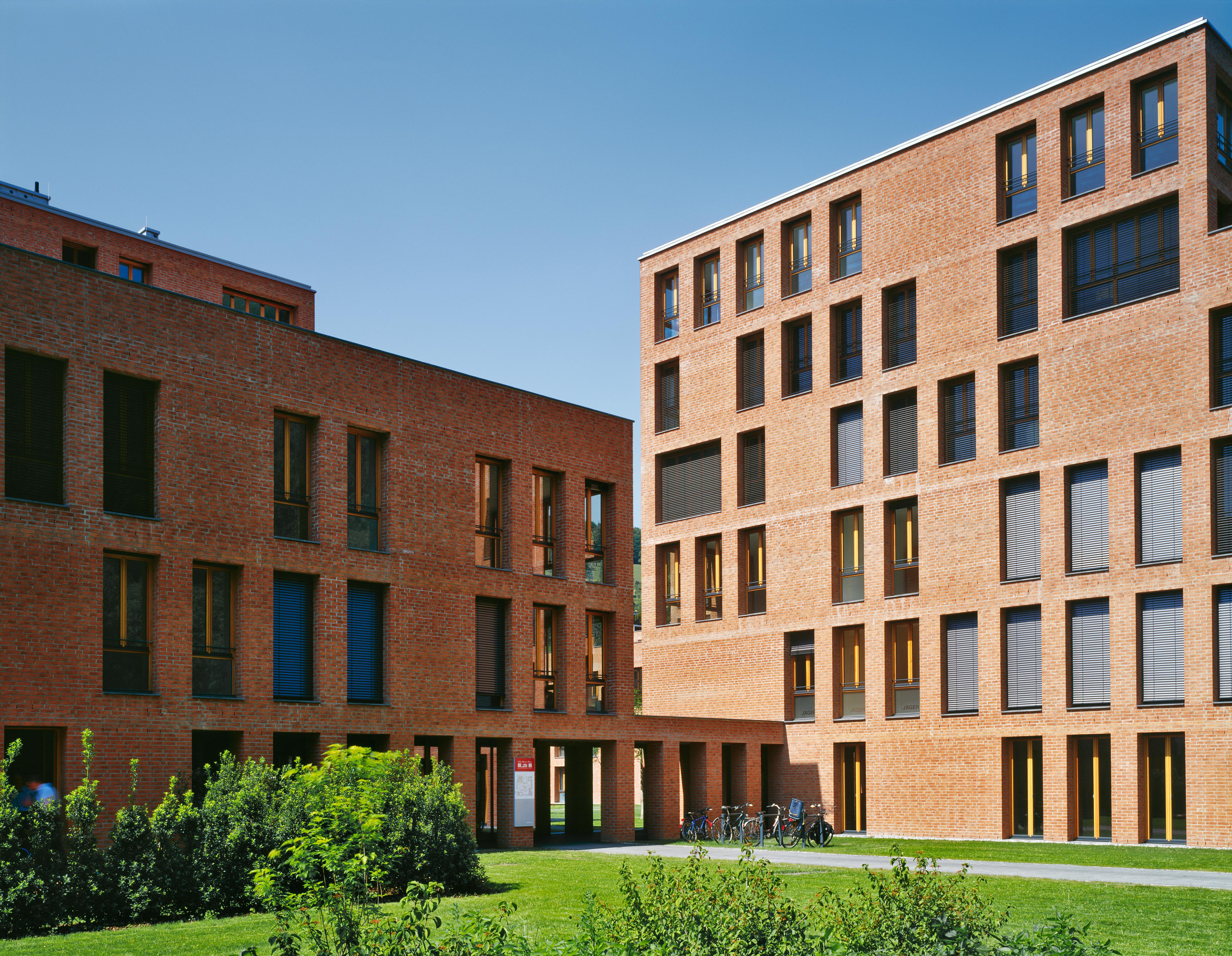 Villa Mento Plaza in Feldkirch, Österreich